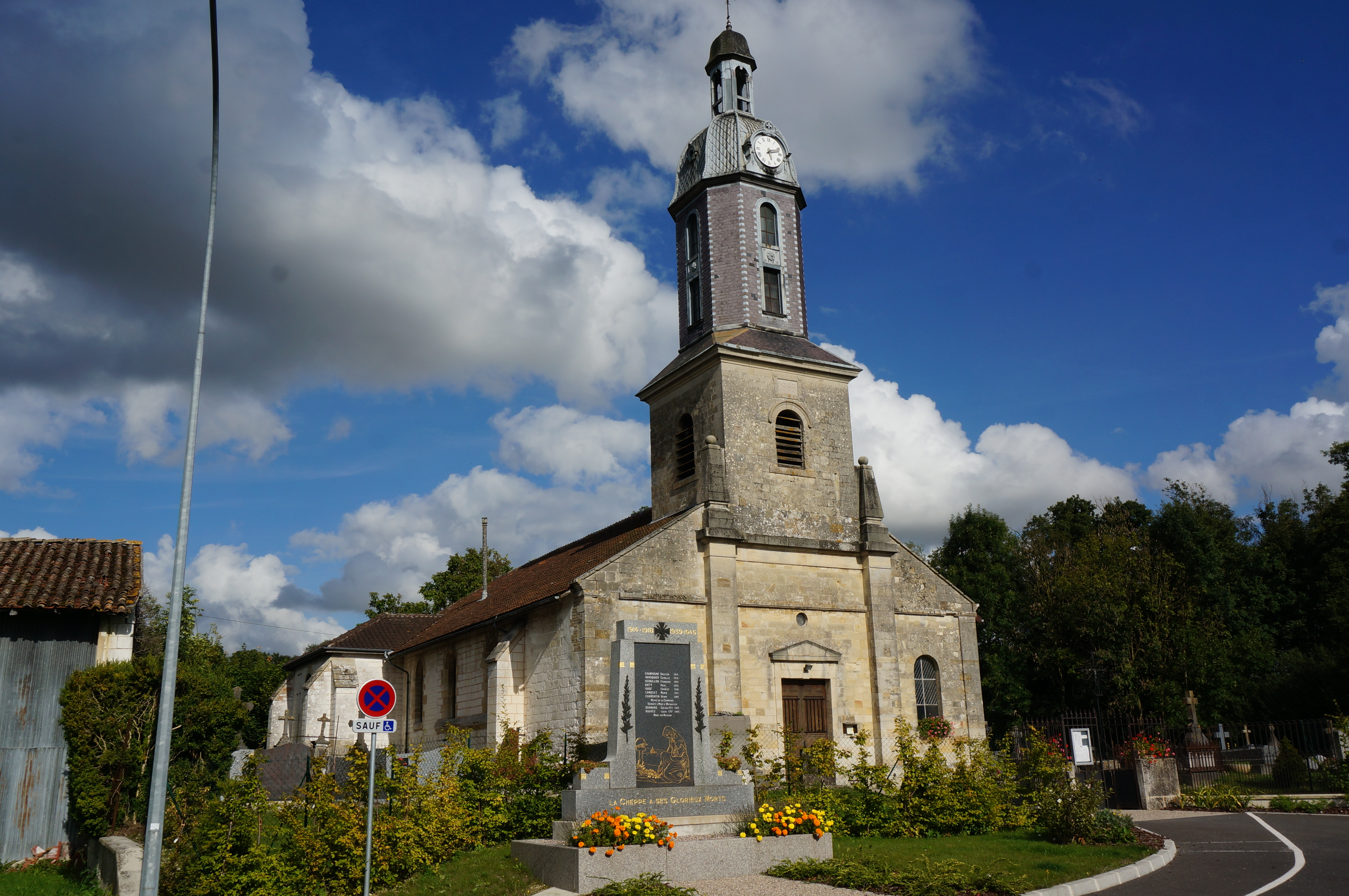 à La Cheppe.